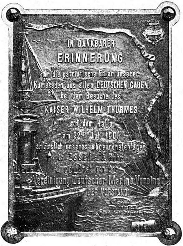 Gedenktafel am Ehem. Kaiser-Wilhelm-Turm in Essen-Stoppneberg